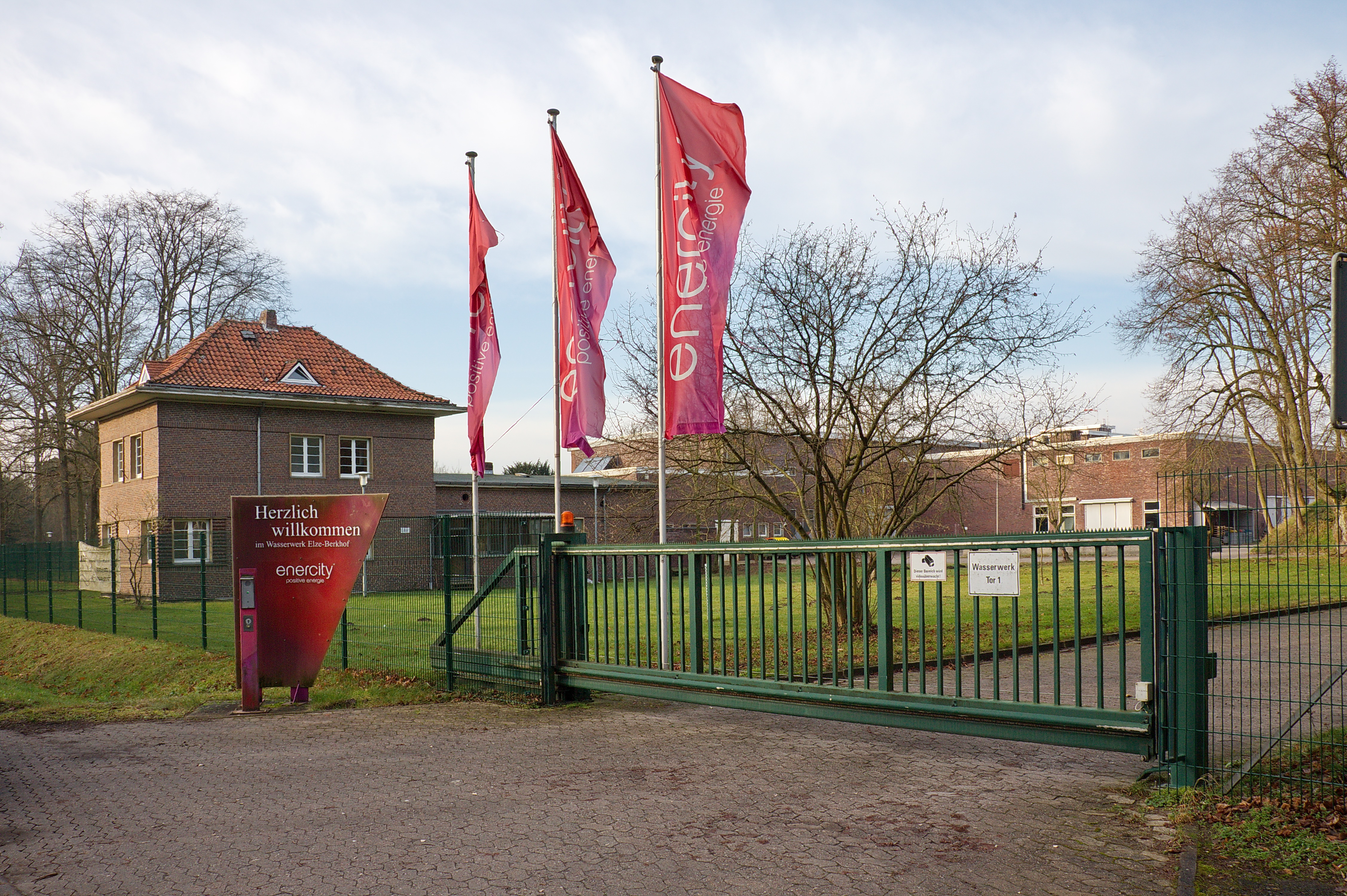 Wasserwerk Elze-Berkhof (Wedemark), Niedersachsen, Deutschland.